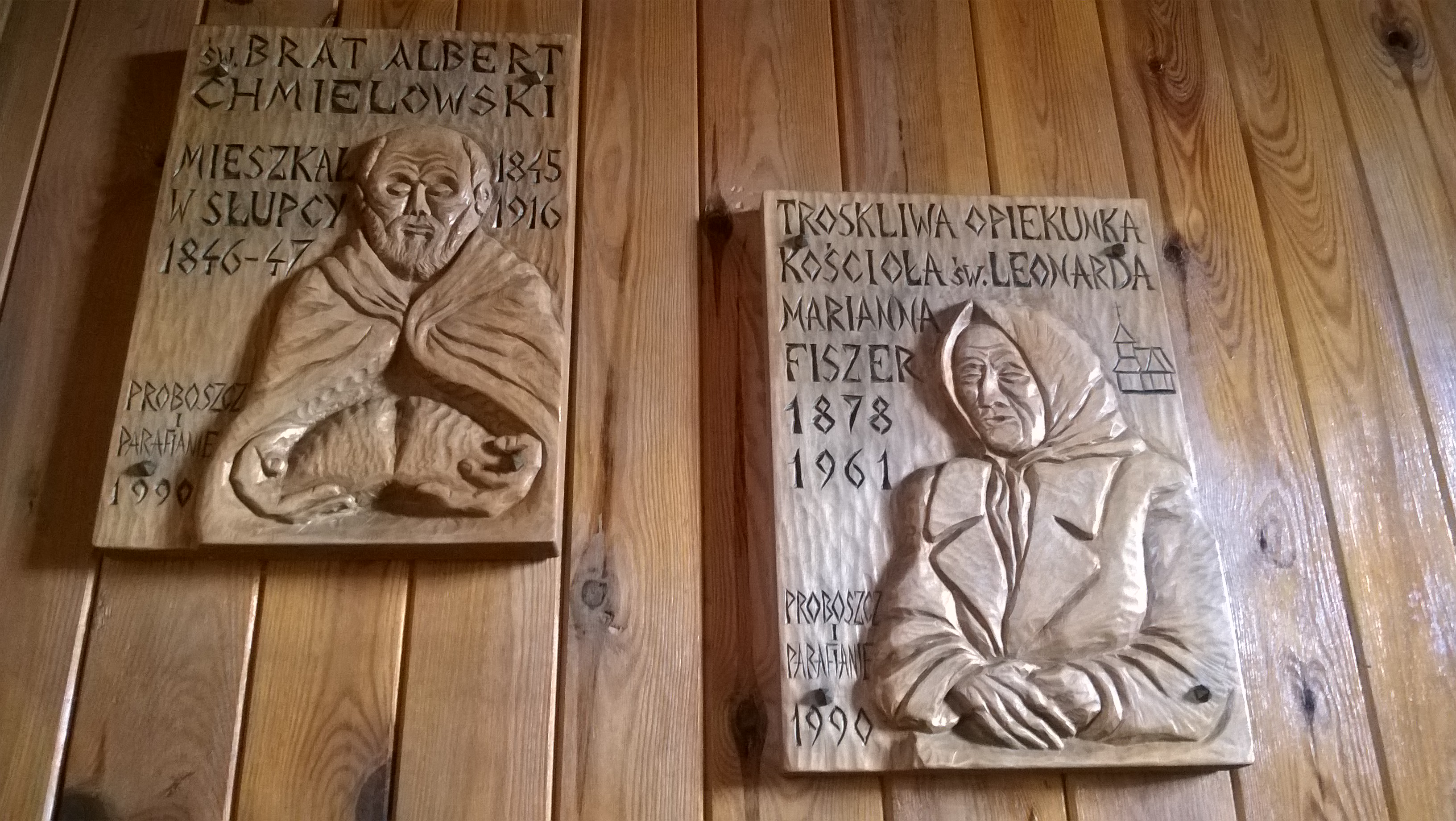 Płaskorzeźby Alberta Chmielowskiego i Marianny Fiszer ufundowane przez parafian w roku 1990, prezentowane w kruchcie pod dzwonnicą.